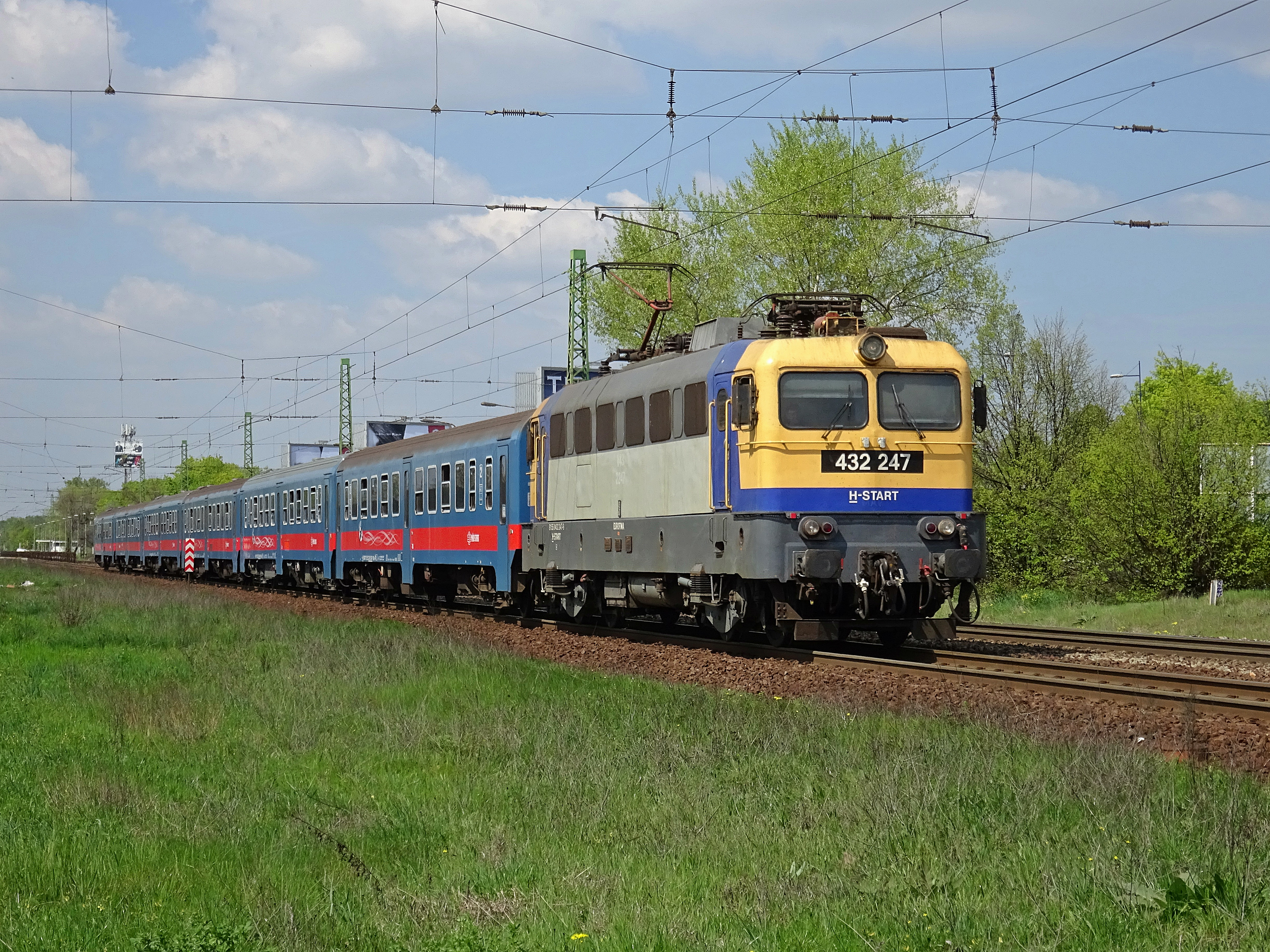 2000-res sorozatú V43-as, a hozzá kialakított elővárosi ingavonati szerelvénnyel halad Monor felé Szemeretelepnél.